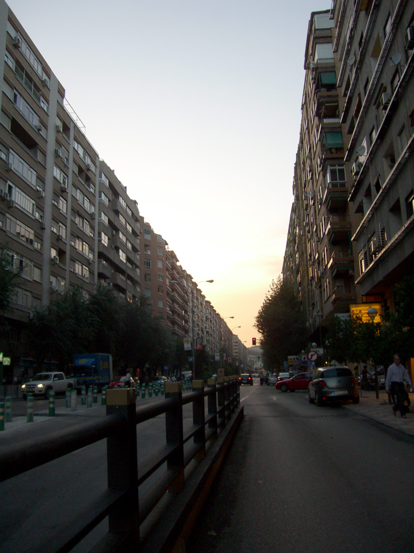 Avenida de Andalucia, Jaén